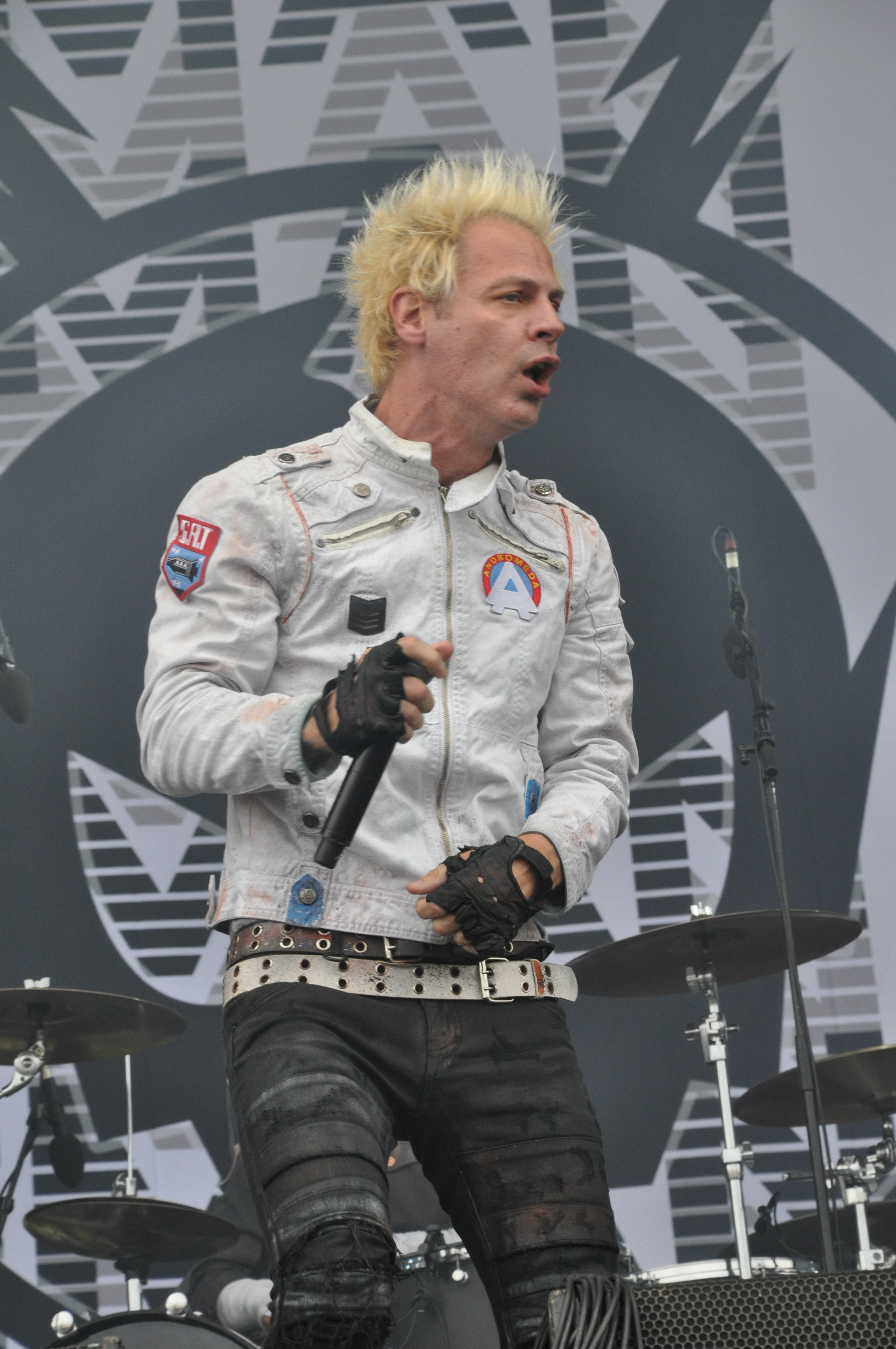 Powerman 5000 auf der Alternastage bei Rock am Ring 2014